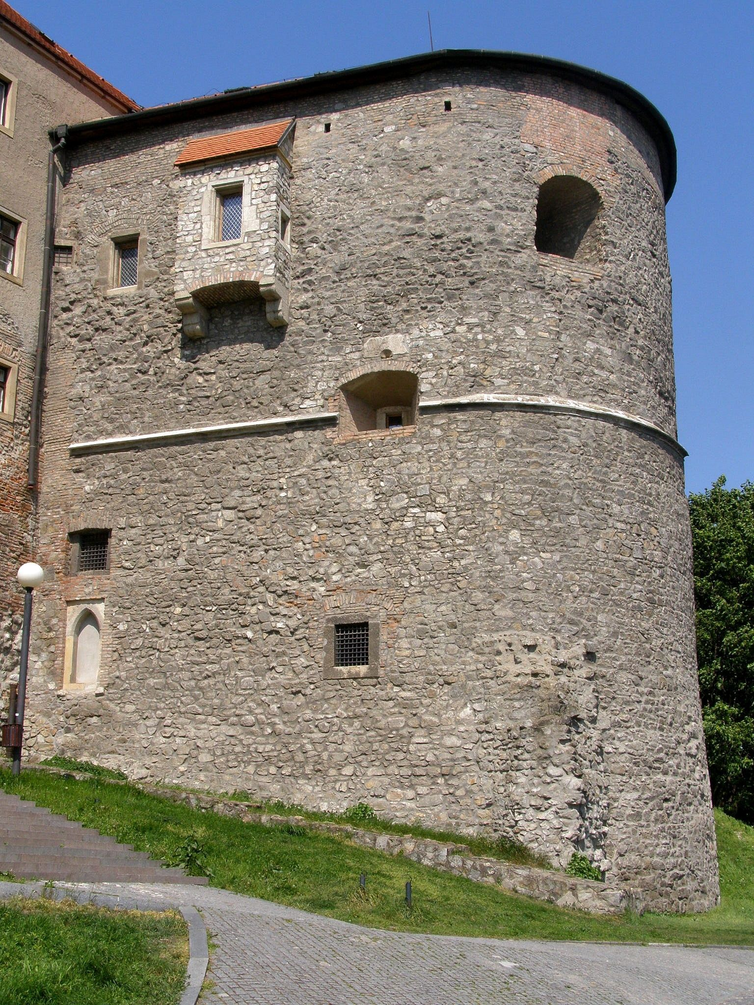 Bašta Luginsland - obranná bašta severného opevnenia This medium shows the protected monument with the number 101-28/14 in the Slovak Republic.